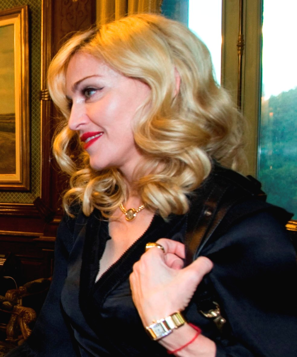 Madonna in Argentina